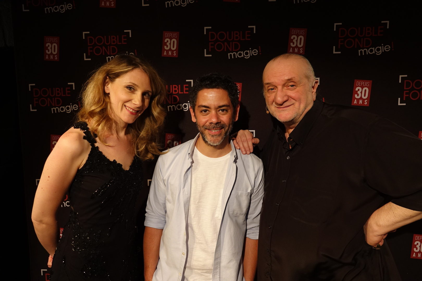 Manu Payet, Dominique Duvivier, et Alexandra Duvivier